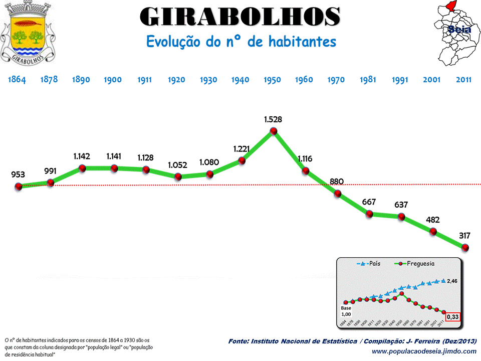 Evolução da População 1864 / 2011